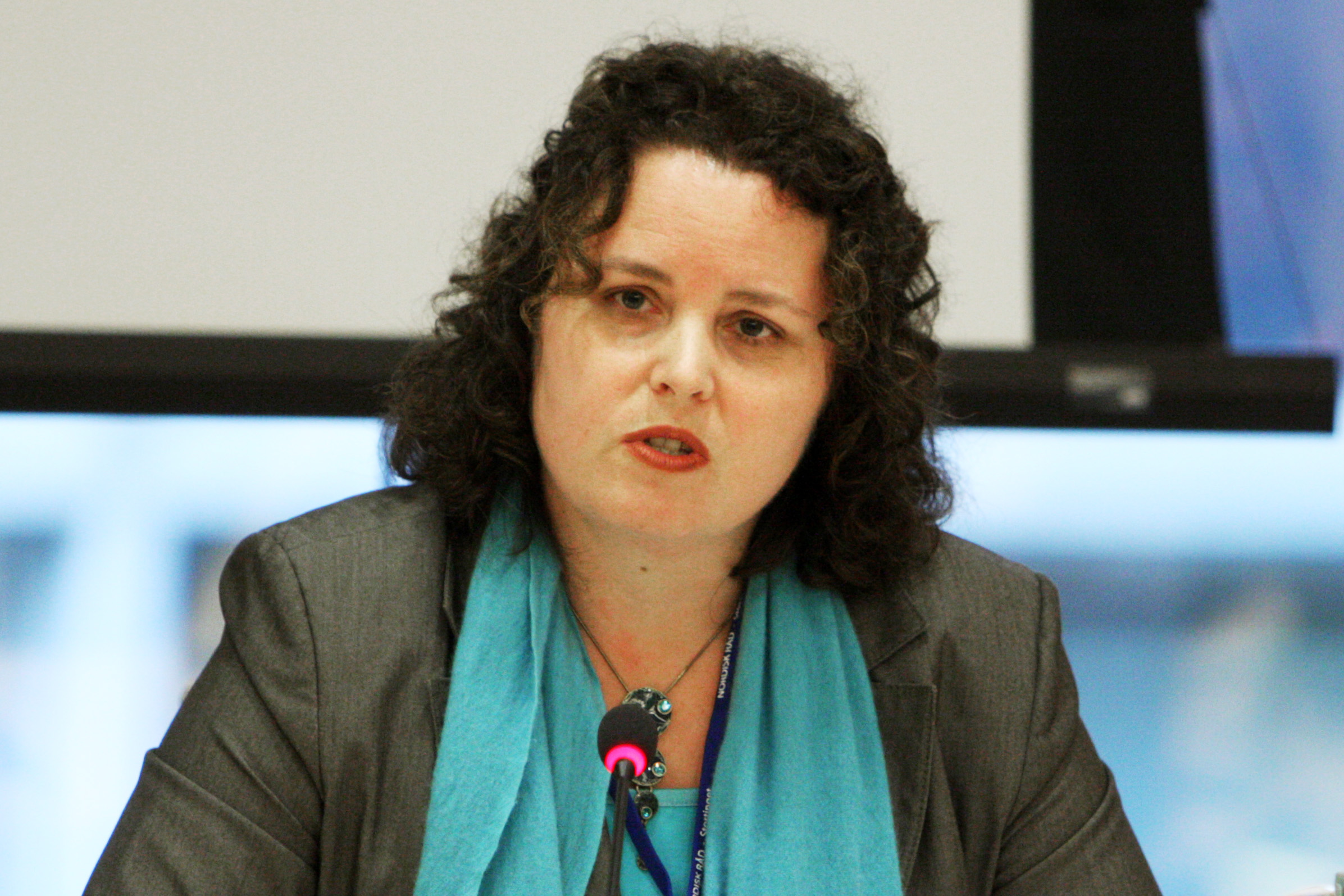 Norges hälsominister Sylvia Brustad vid Nordiska Rådets session i Oslo. 2007-10-31. Foto: Magnus Fröderberg/norden.org